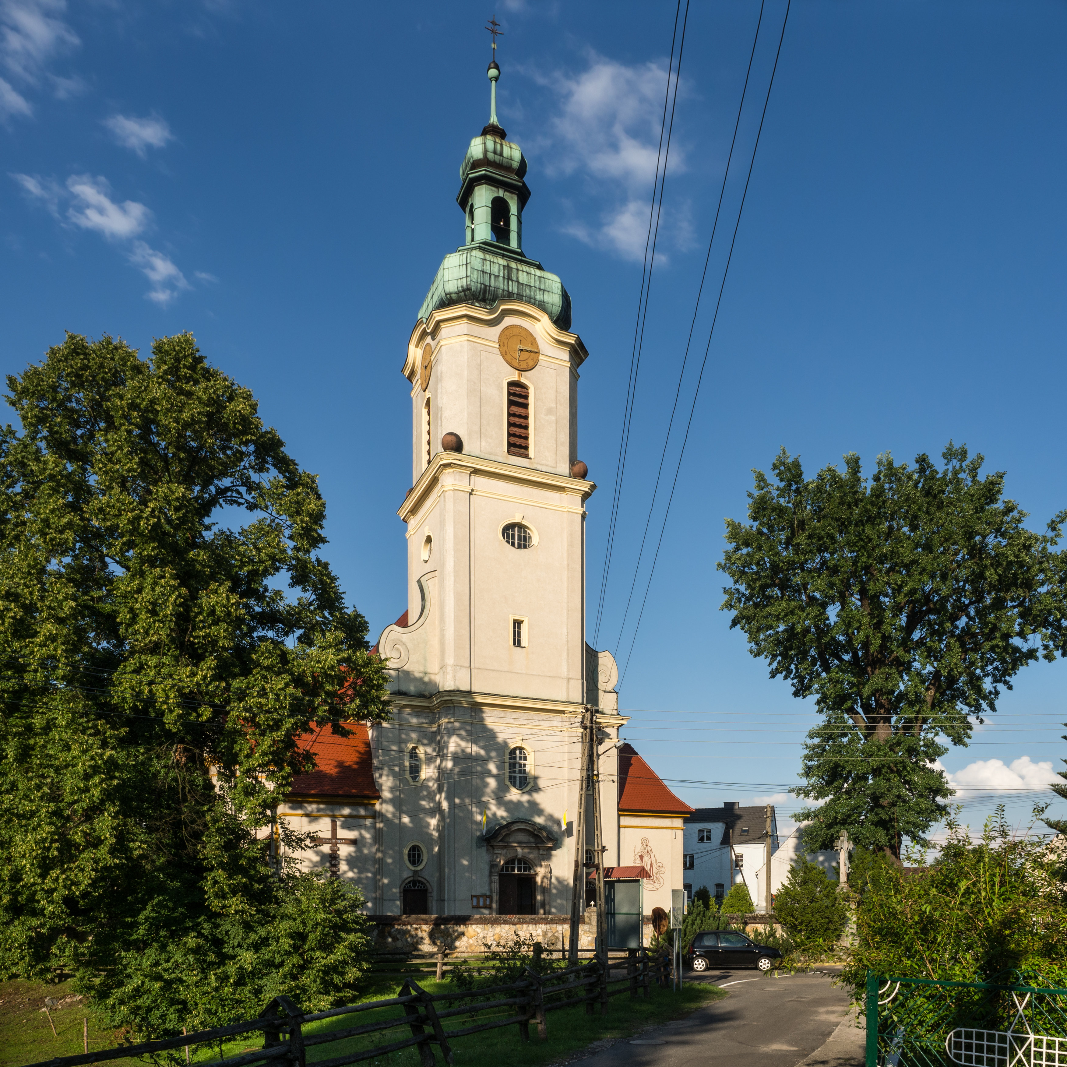 Krasiejów, kościół par. p.w. św. Małgorzaty, 1911-1913